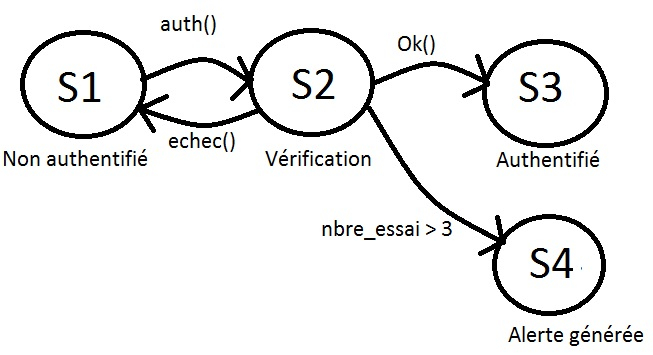 Décrit les états parcourus lors d'une authentification